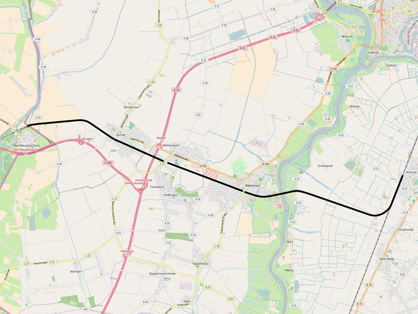 DB 1575, Ihrhove - Nieuweschans